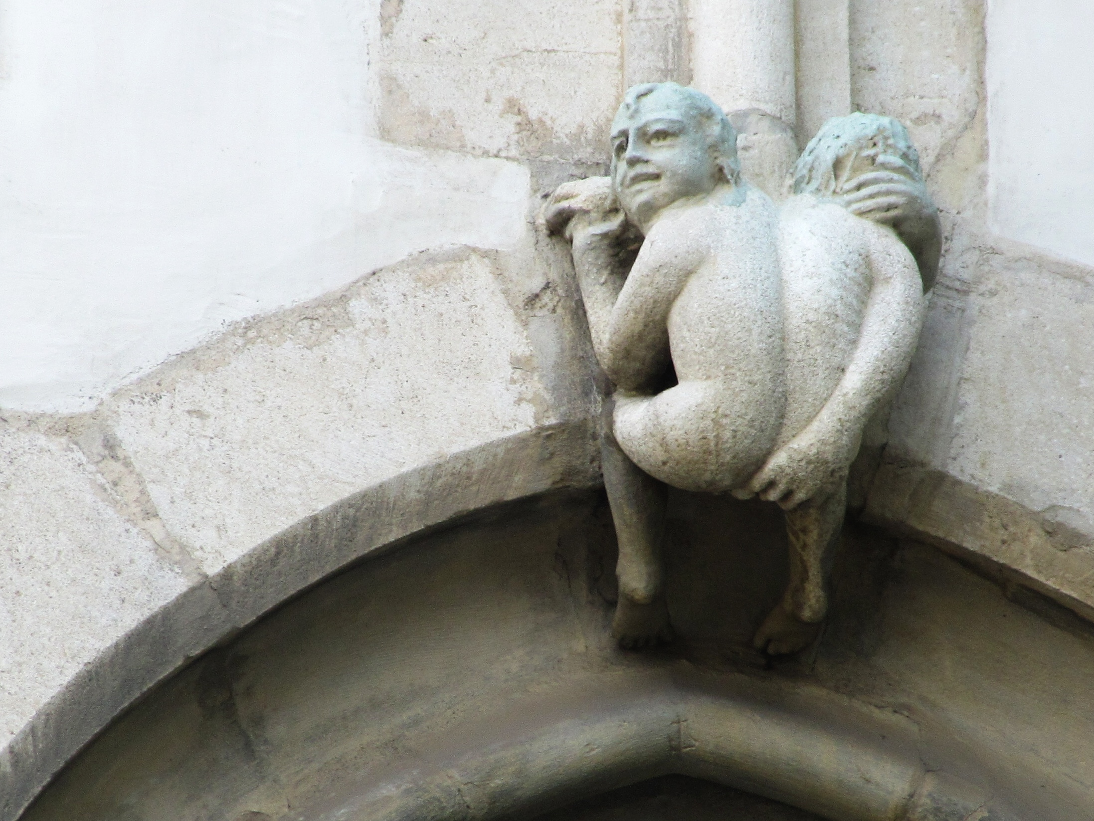 Drolerie zvaná Nehaňba na jižní fasádě věže kostela